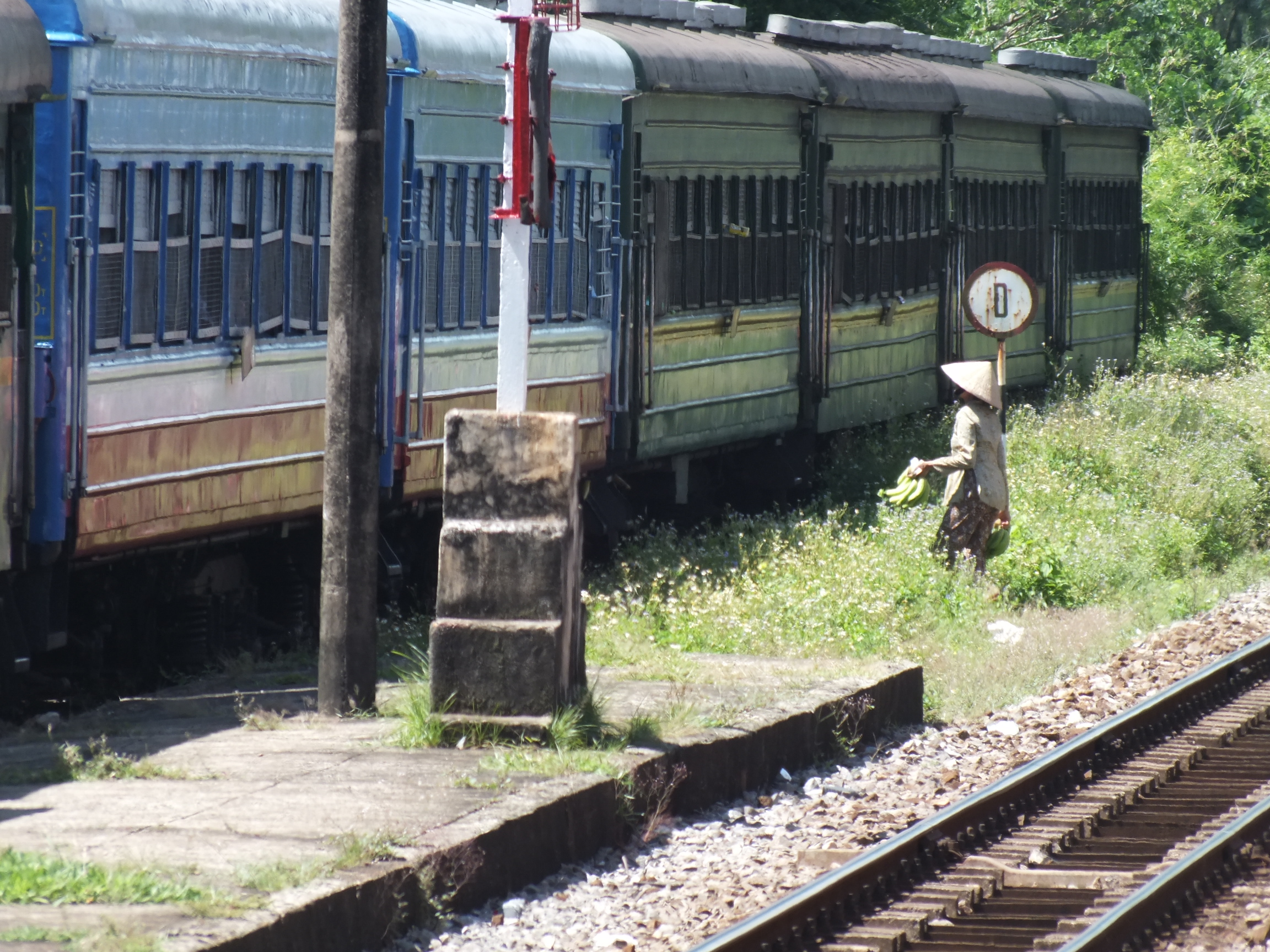 2013-07-16 North–South Railway (Vietnam) バナナ売り